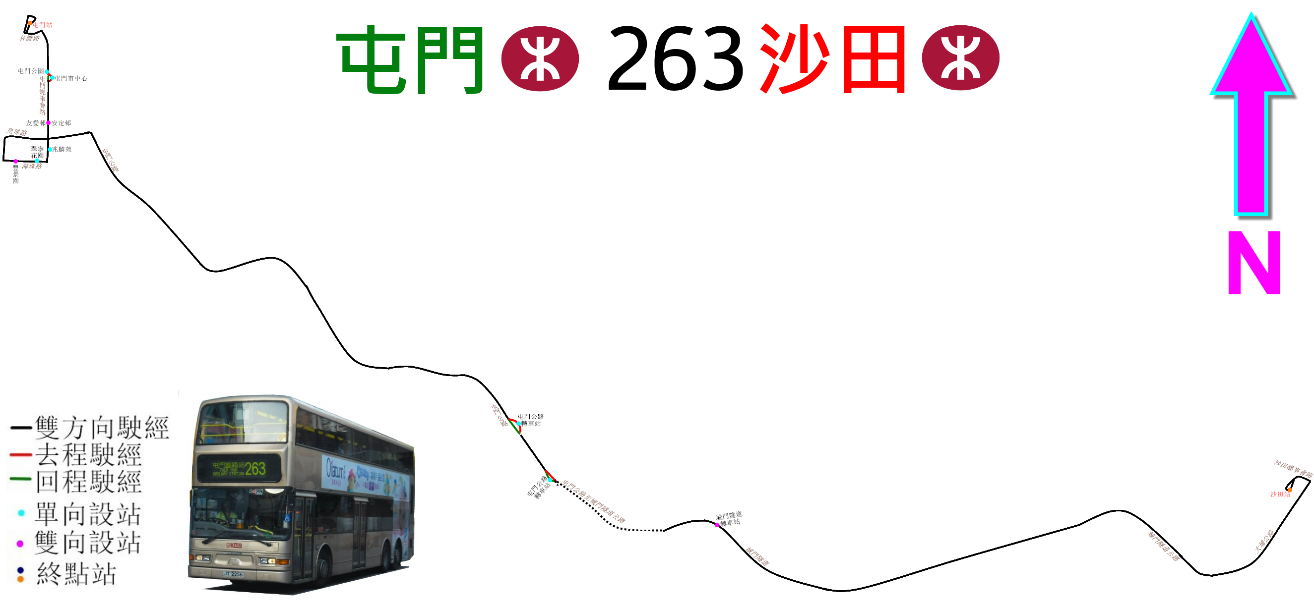 中文（香港）: 九巴263線的走線圖